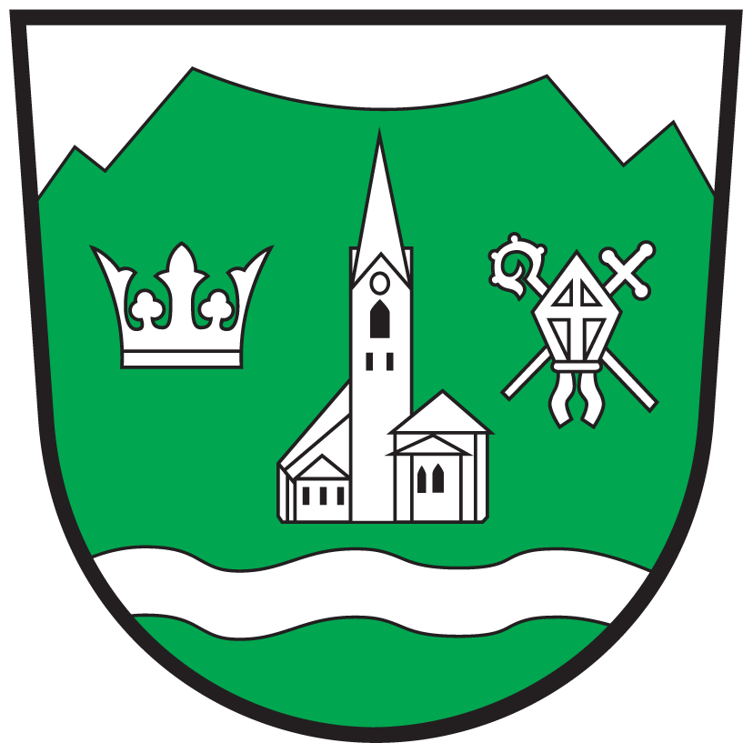 Wappen von Berg im Drautal